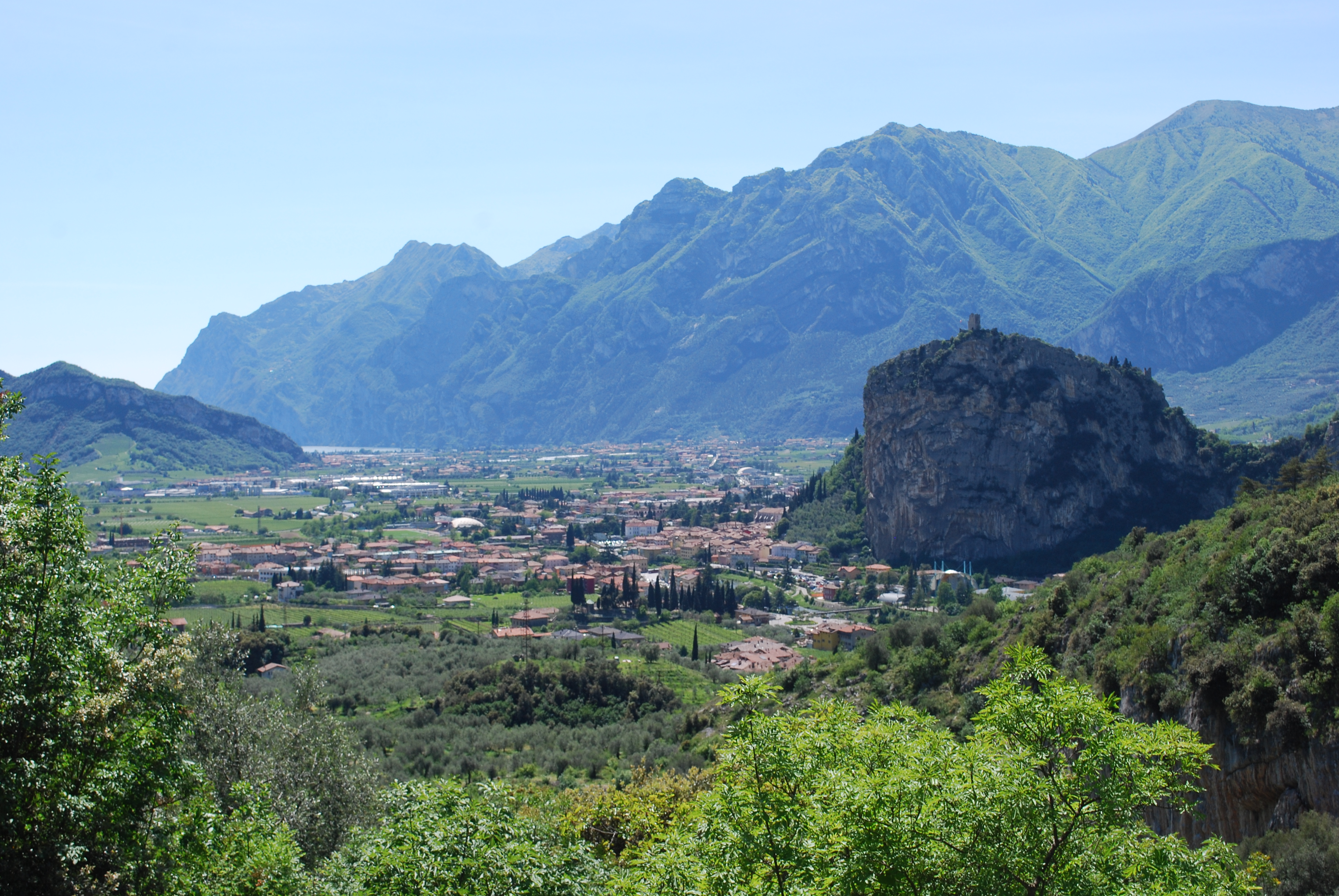 Arco from massone